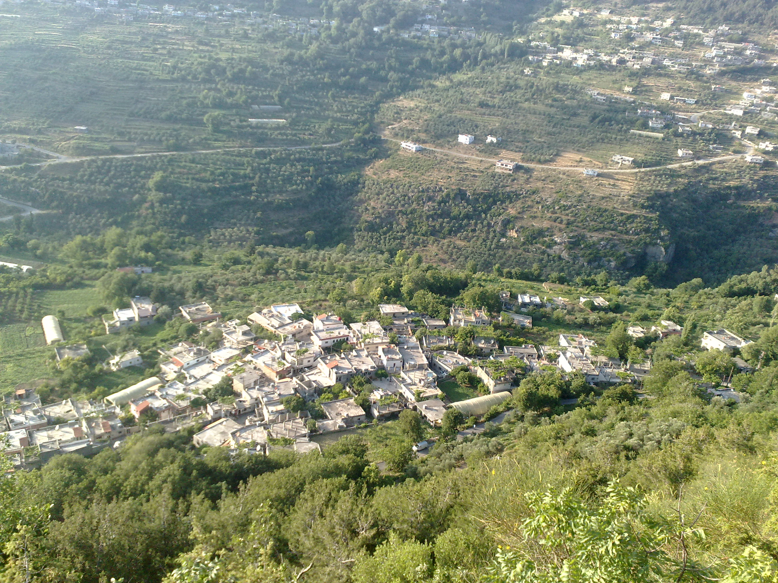 منظر القرية من الجبل